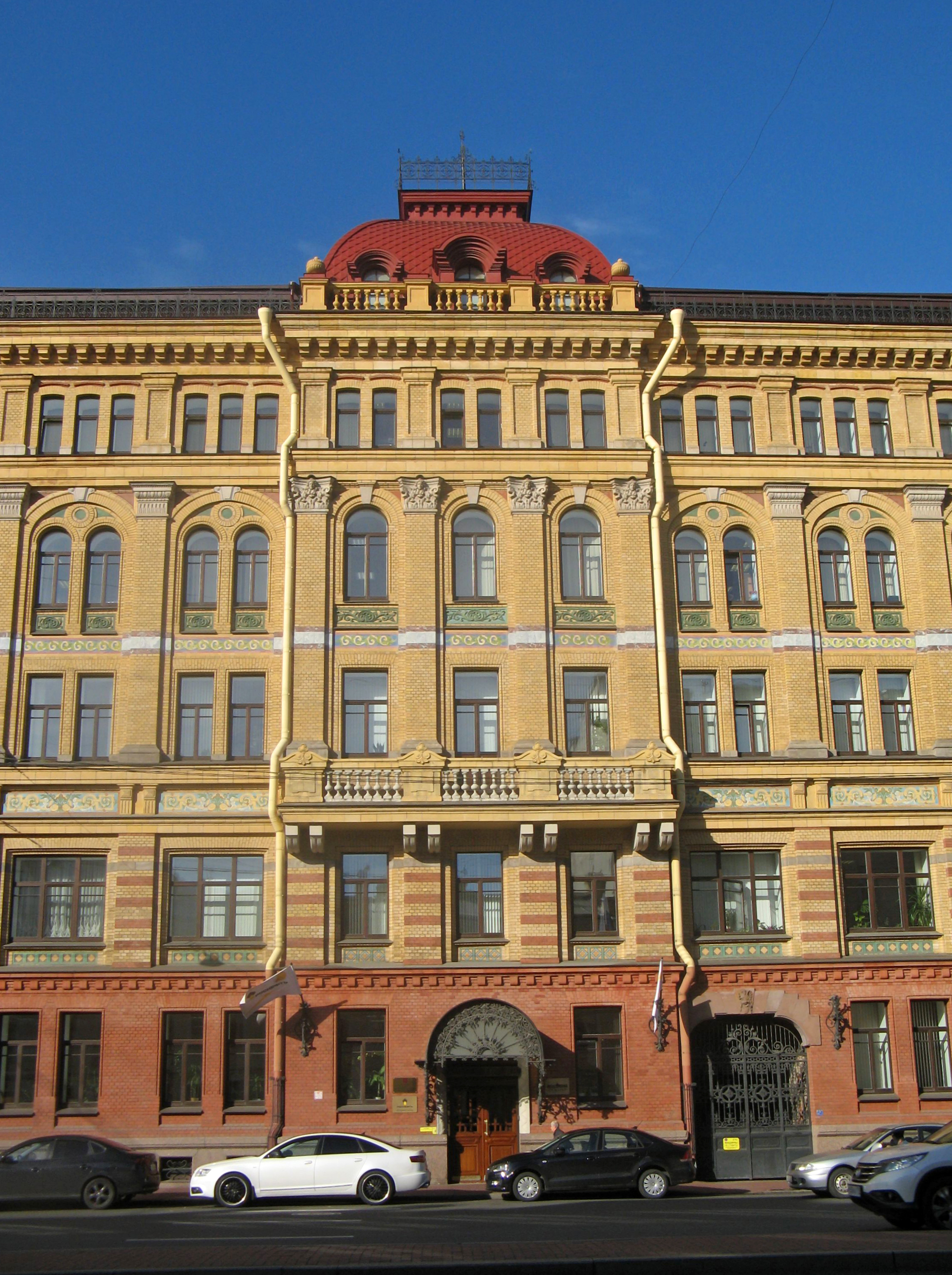 Жилой дом с гимназией при типографии А.Ф. Маркса: Измайловский проспект, 29, Адмиралтейский район, Санкт-Петербург